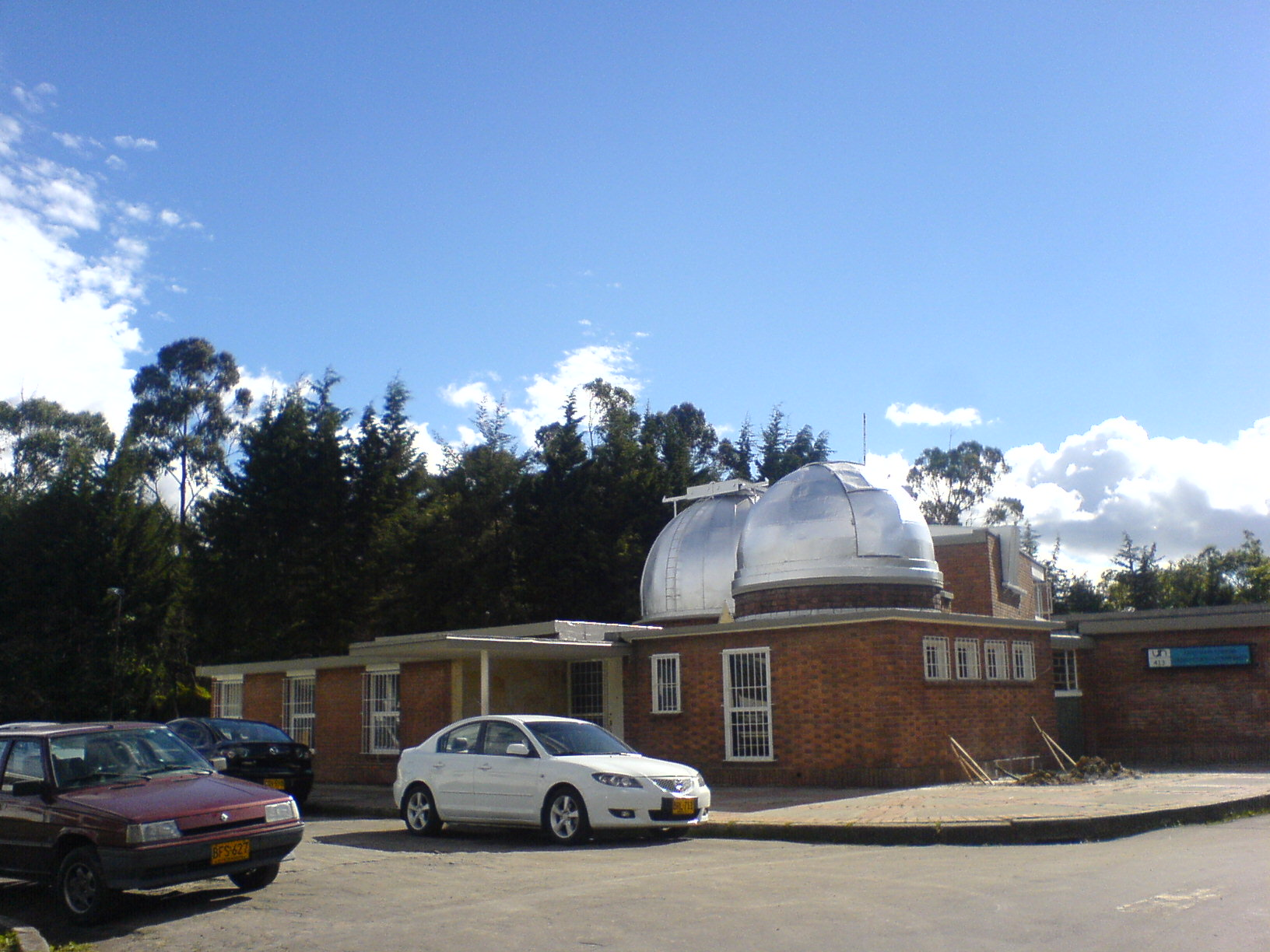 Observatorio Astronomico Nacional